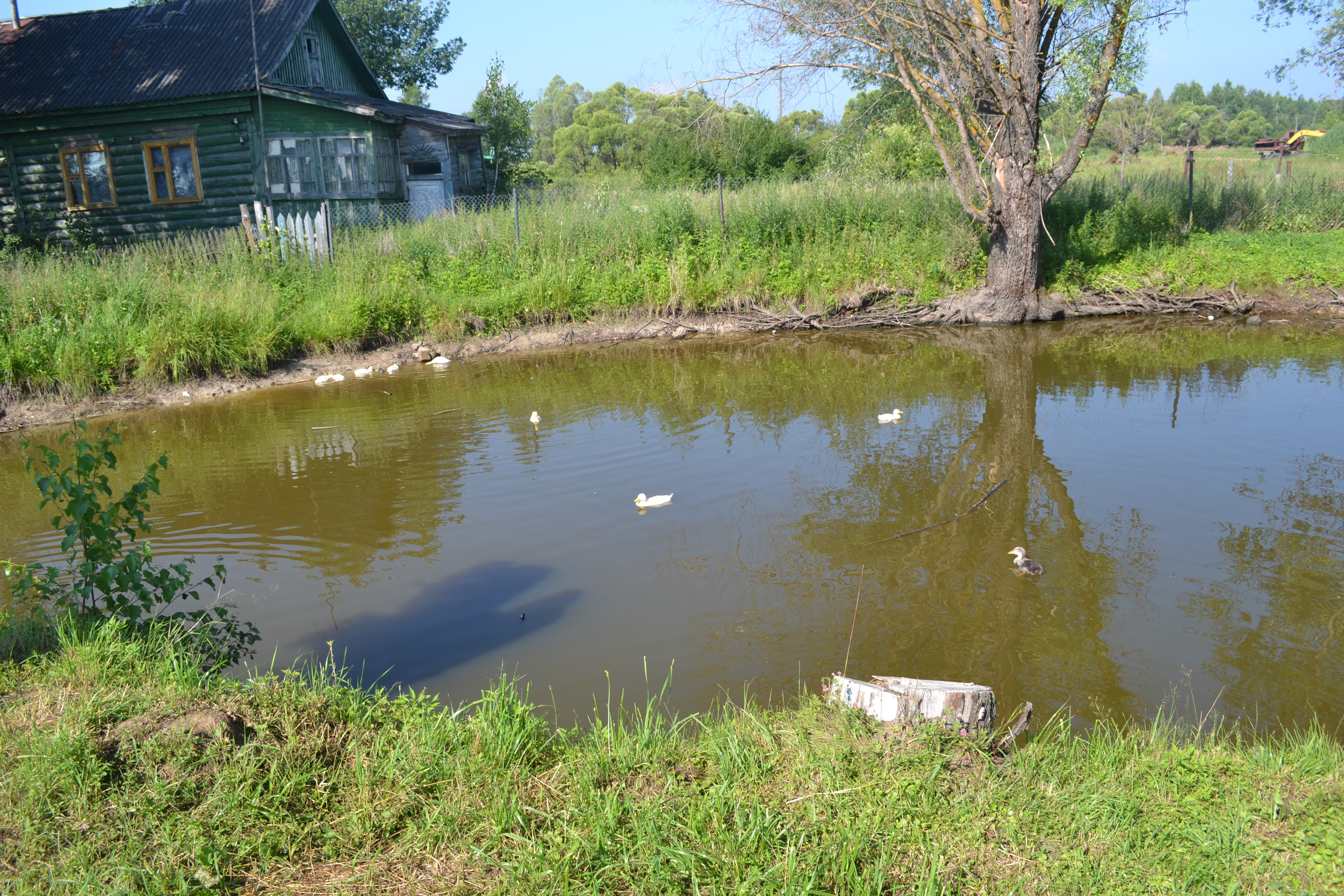 Пруд в деревне Горелово (Шатурский район)